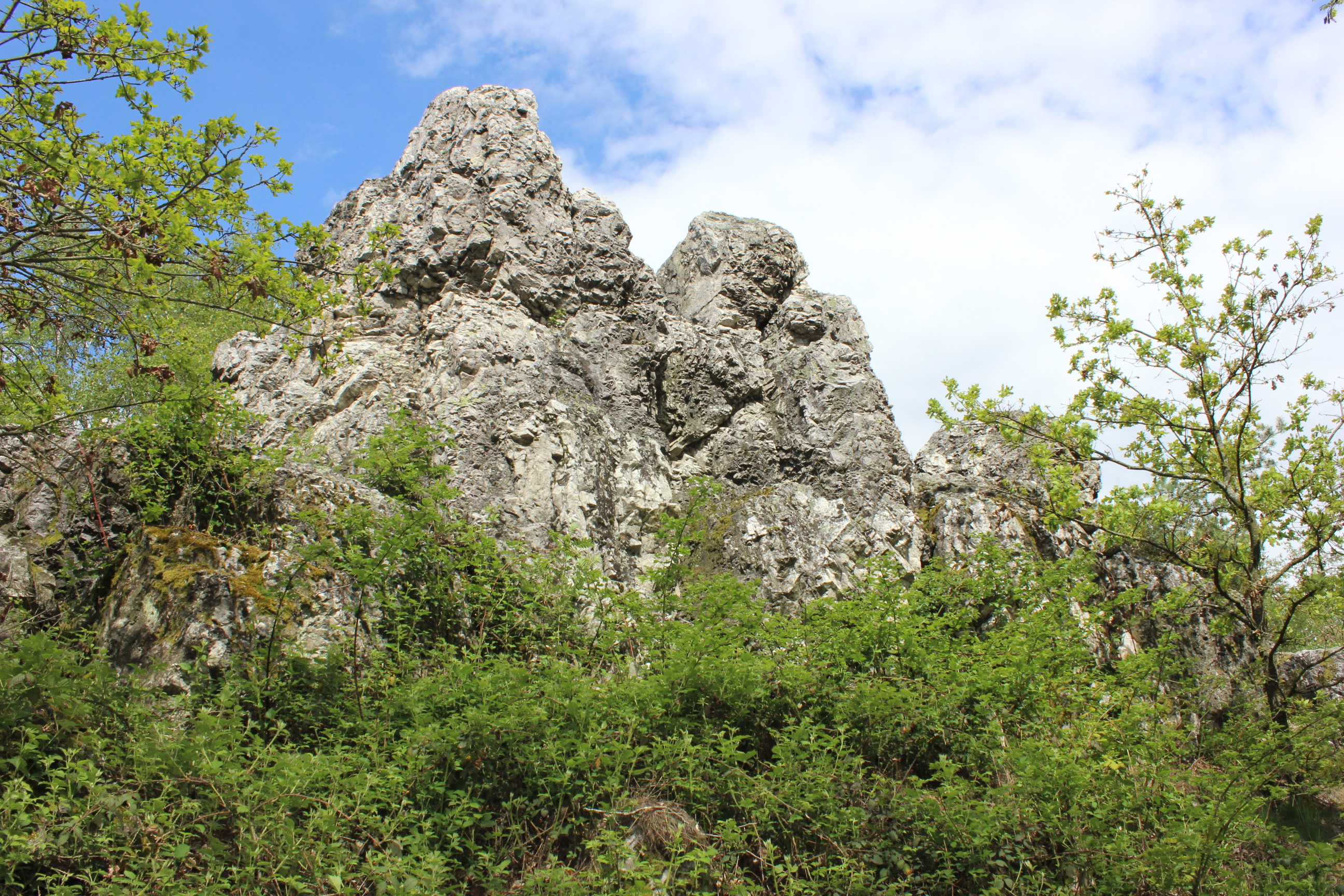 Geotop "Moosbacher Pfahl" im Landkreis Regen, Nr. 276R001